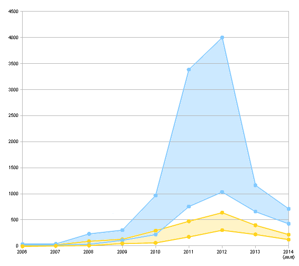 Gráfica de las máximas y mínimas de la prima de riesgo de Grecia y de España entre enero de 2006 y julio de 2014. En azul, Grecia, en naranja, España.